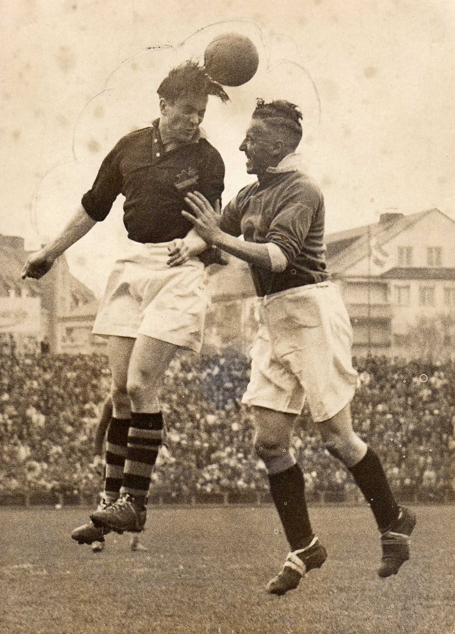 Årets bild i Aftonbladet 1946. AIK-Birmingham City FC på Råsunda 1946, slutresultat 1-2. Arne Andersson i nickduell med Wilson Jones.